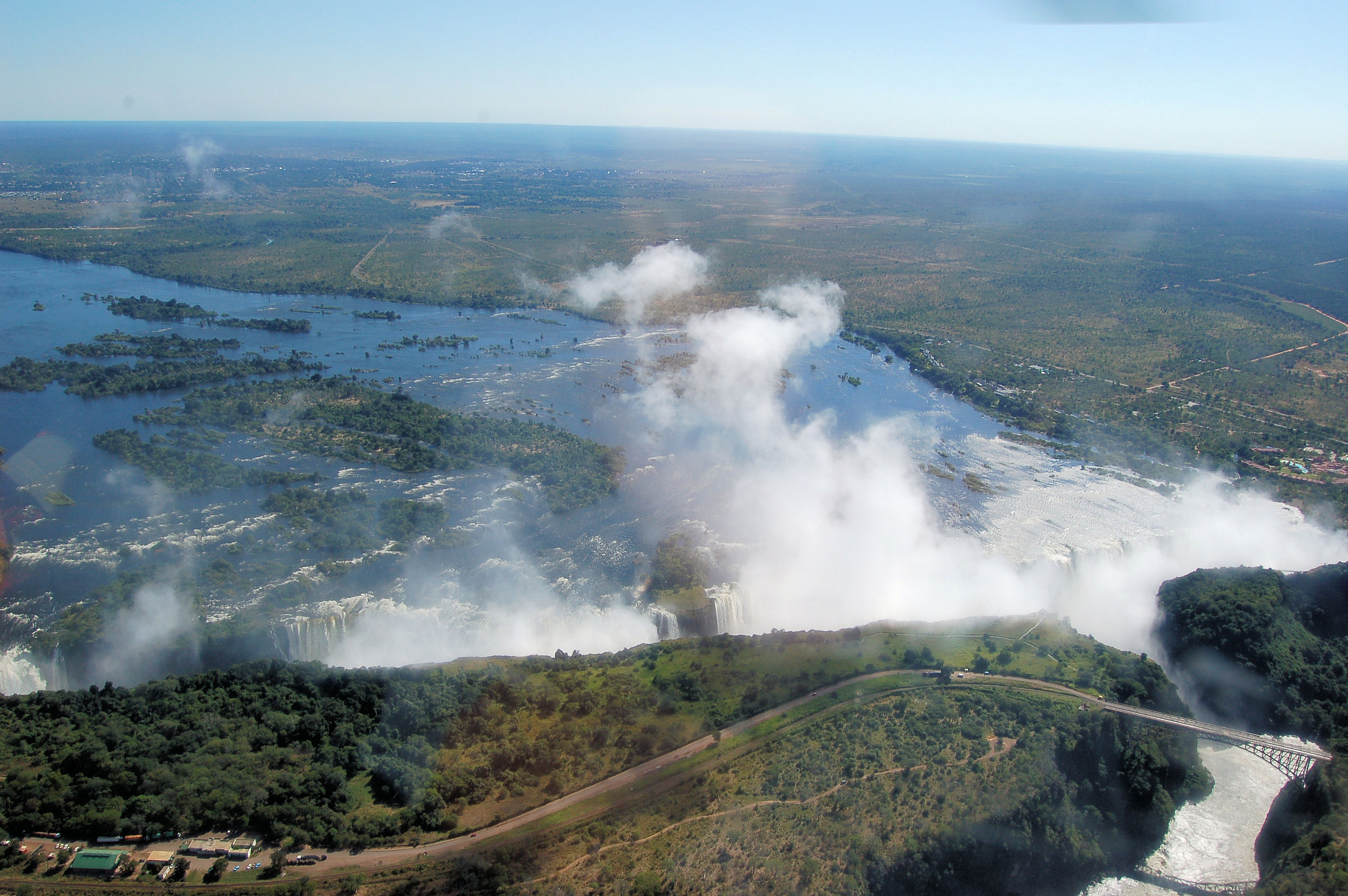 Victoria Falls, Zambia